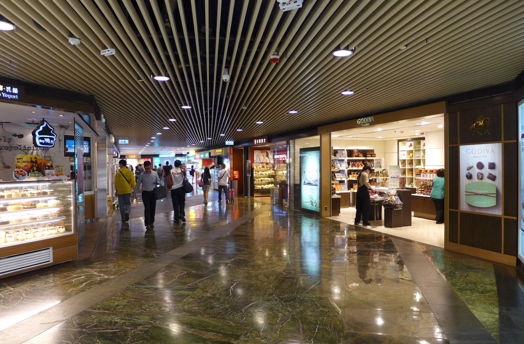 Langham Place B2 Corridor